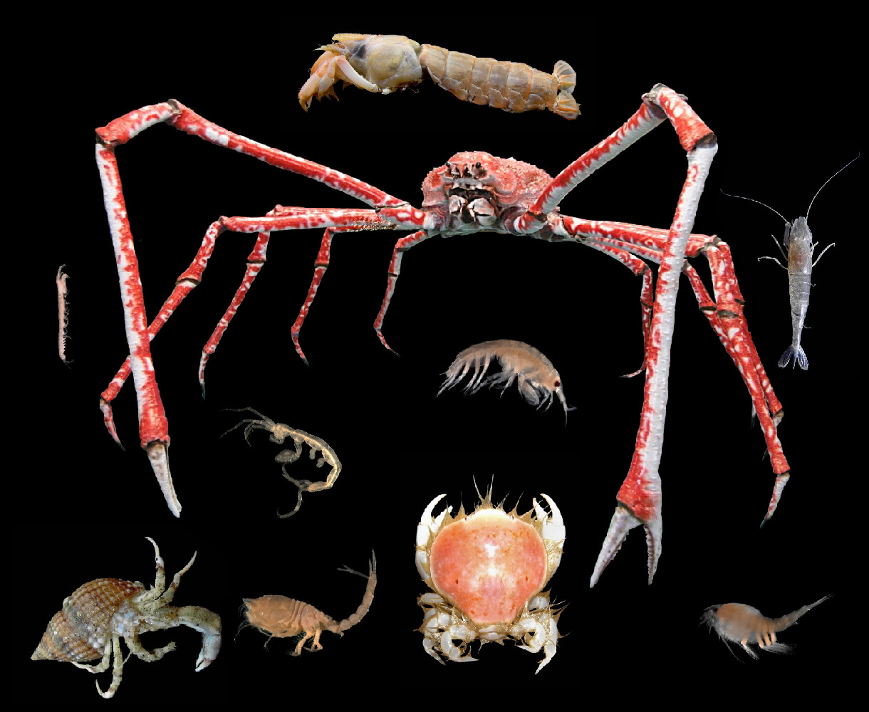 Crustacea collage